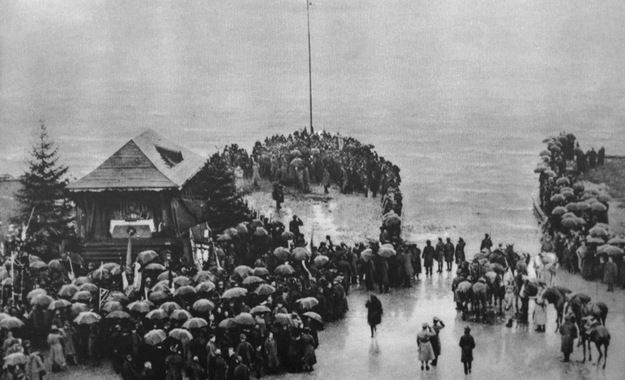 Zaślubiny Polski z morzem - generał Józef Haller rzuca pierścieć w Bałtyk, 10.02.1920 r